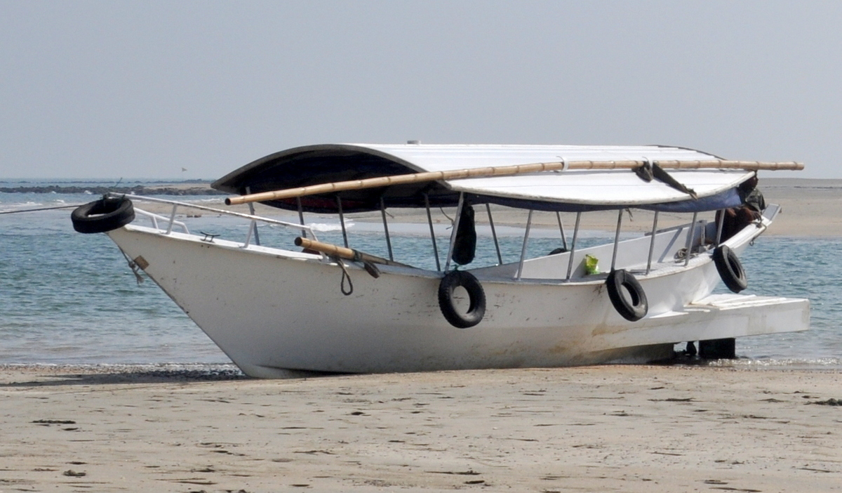 Un Mandoris de TaraTari à St Martin